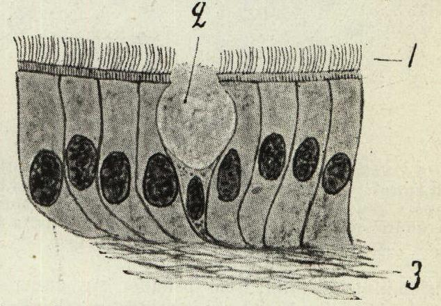 Fig. 5. Från en liten bronks slemhinna, l cilier på de cylindriska epitelcellernas fria ytor; 2 slemproducerande, ej cilier förande epitelcell; 3 slemhinnans bindväfslager.